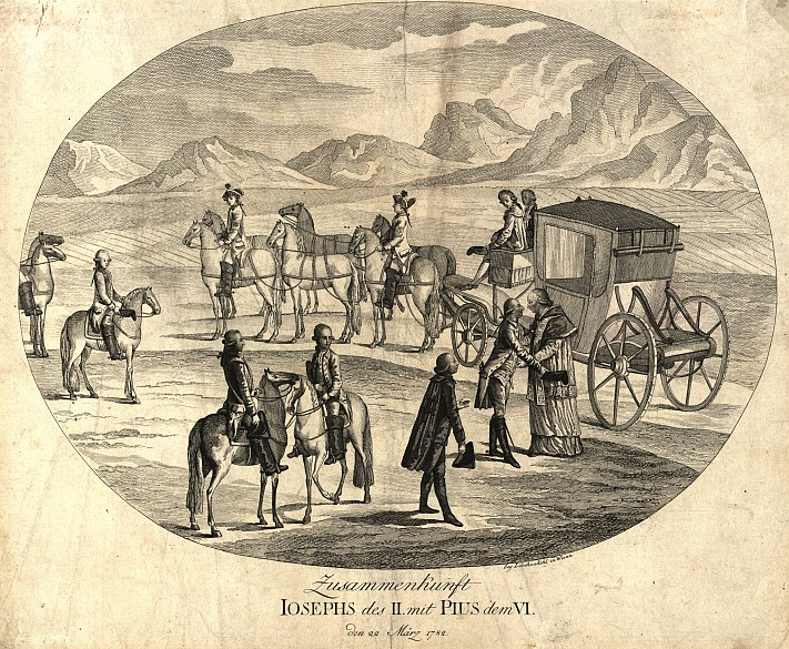 Hieronymus Löschenkohl (1753–1807): Kaiser Joseph II. begrüsst Papst Pius VI. zwischen Neunkirchen und Stuppach, 22. März 1782.